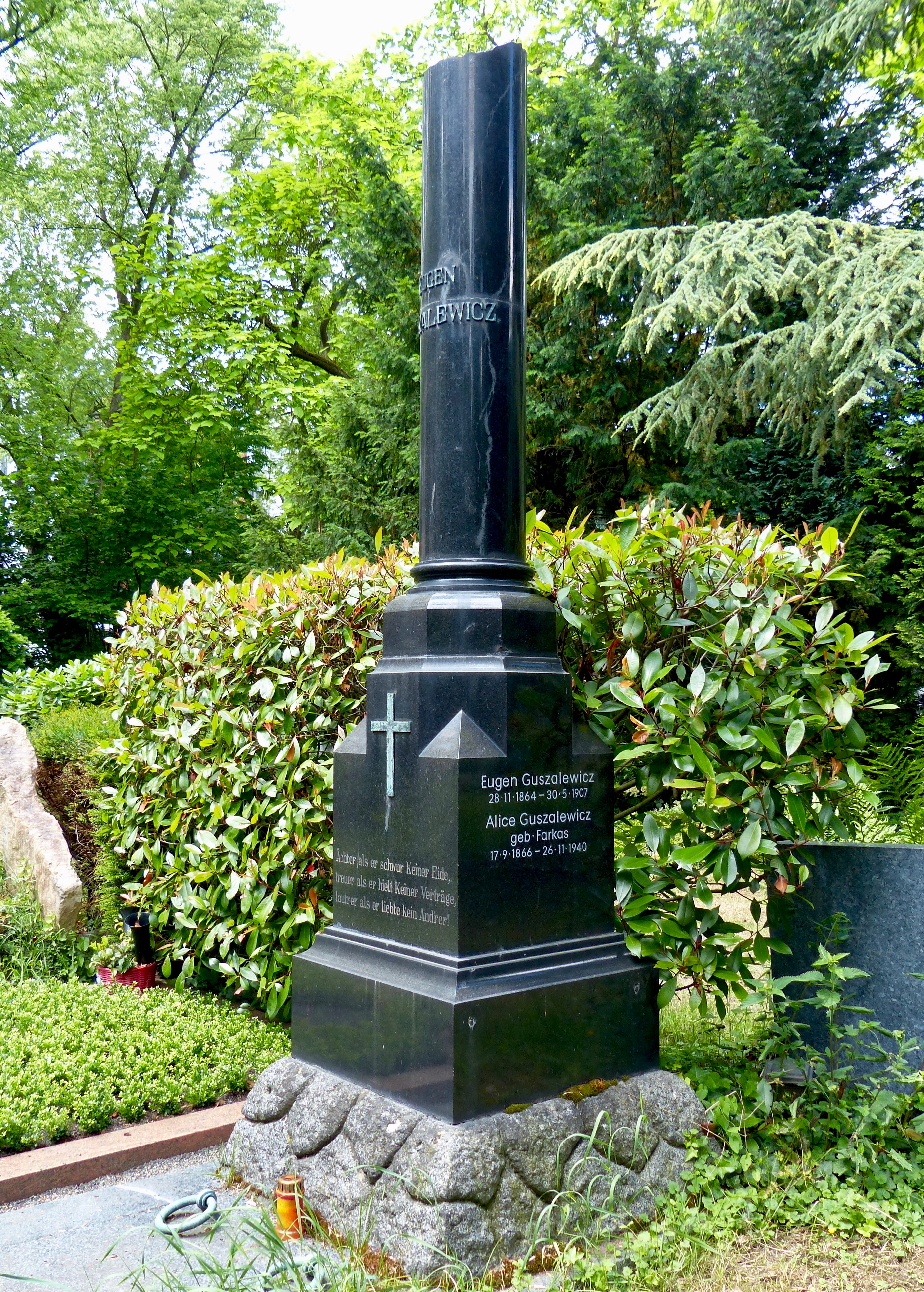 Familiengrab Eugen, Alice, Genia Guszalewicz und Paulina Olga Guszalewicz-Kuckelkorn; Flur 52